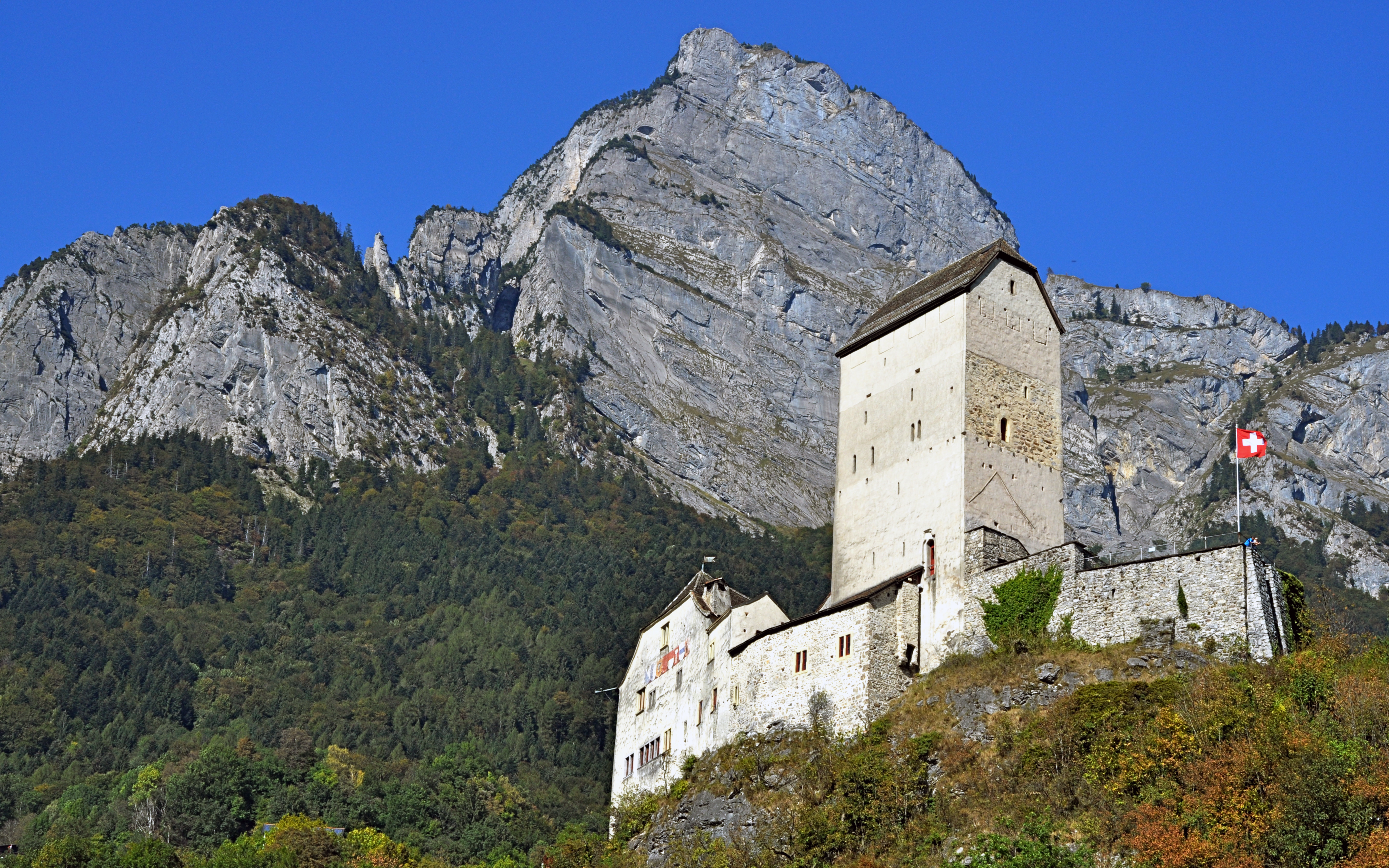 Das Schloss Sargans mit dem Gonzen (Kanton St. Gallen / Schweiz)